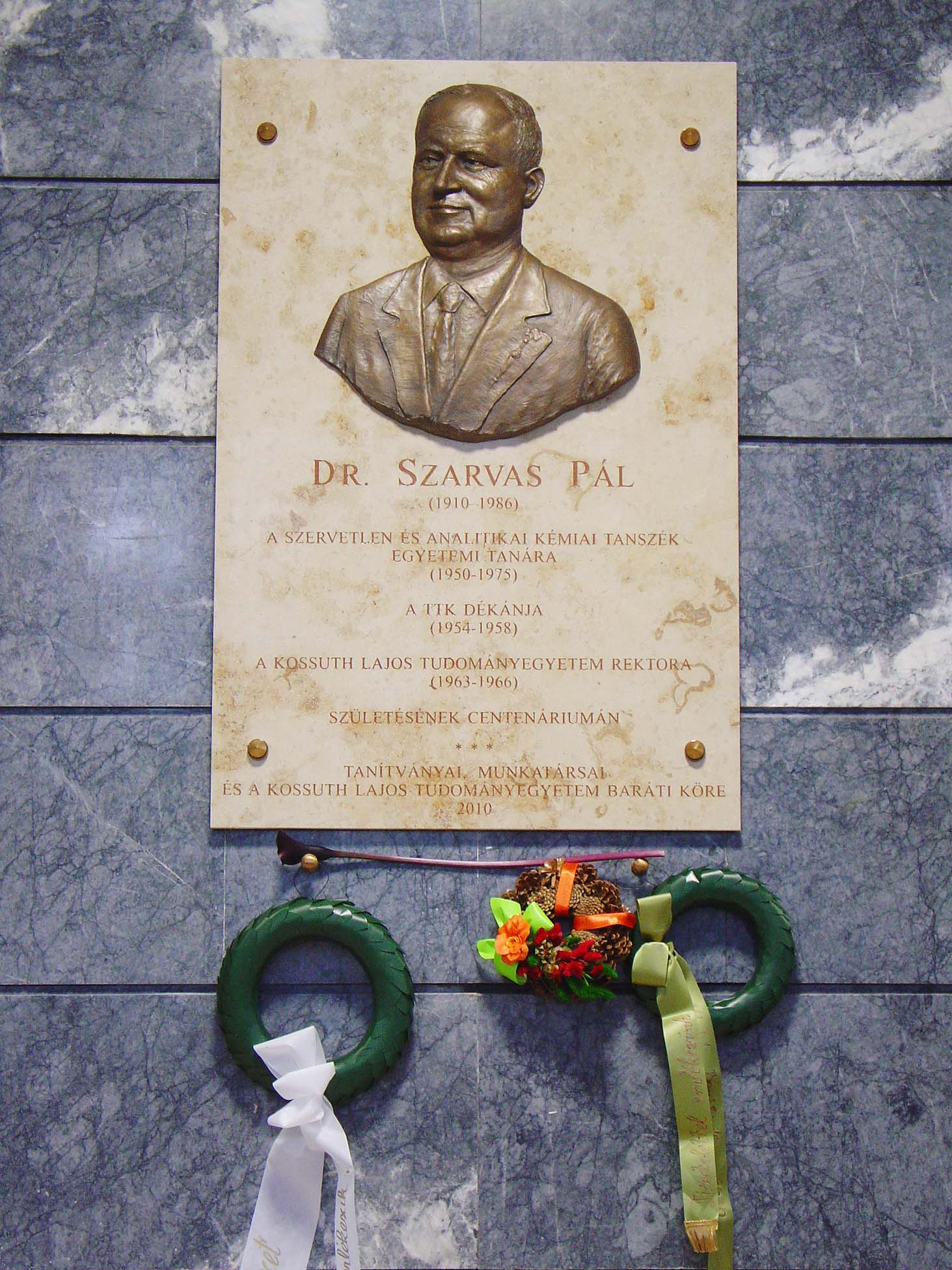 Juha Richárd: Szarvas Pál egyetemi tanár domborműves emléktáblája Debrecenben (Debreceni Egyetem, Kémia tanszék előcsarnoka)